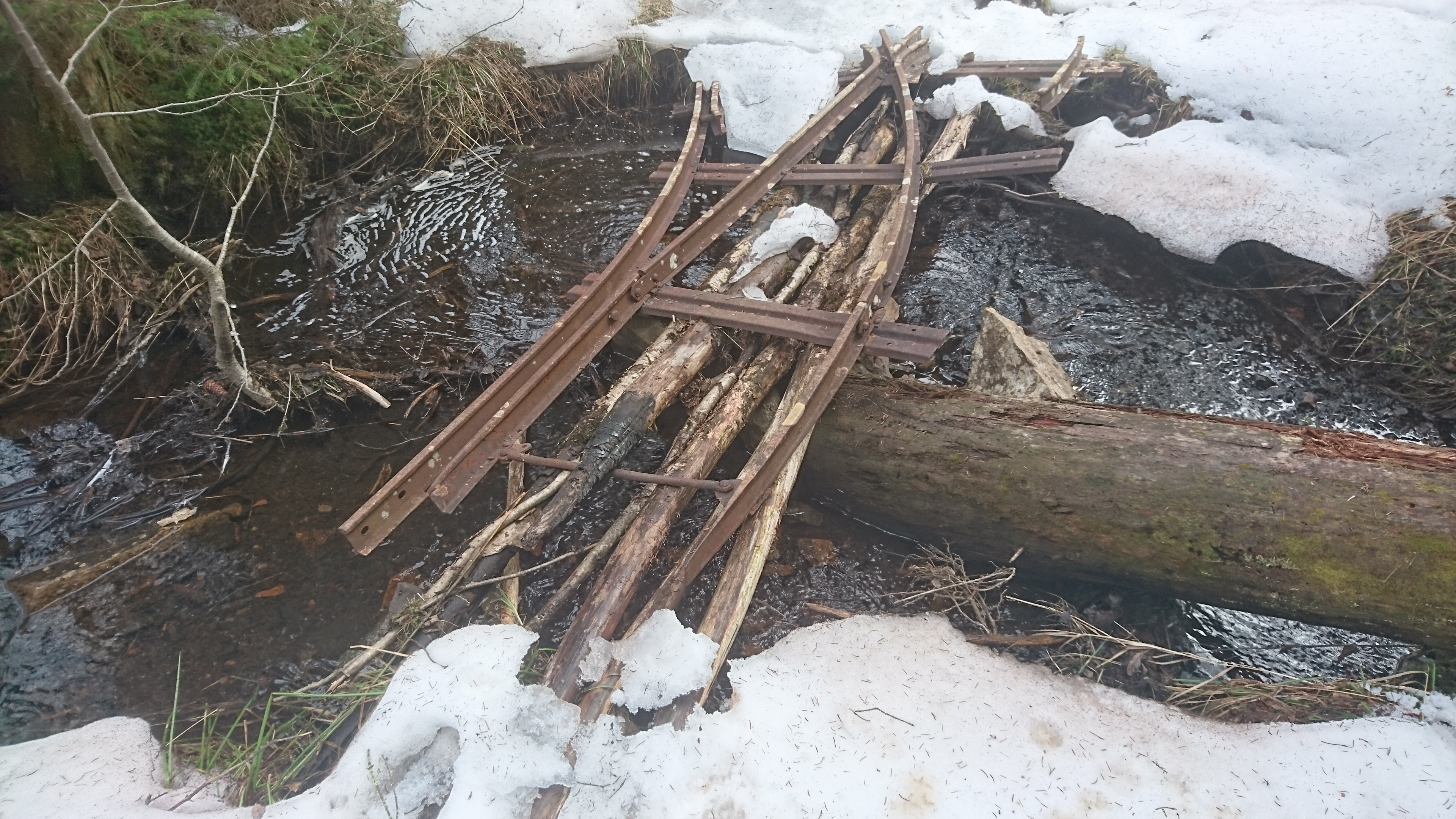 Skinnegang utenfor Spenningsbygruva